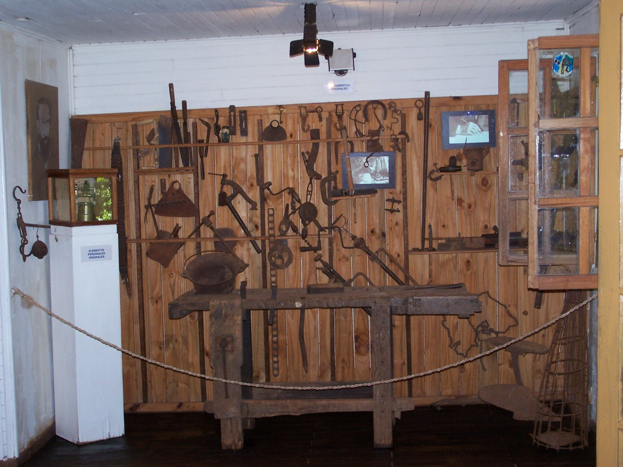 Herramientas originales de Horacio Quiroga (foto museo casa Horacio Quiroga - MISIONES - ARGENTINA)